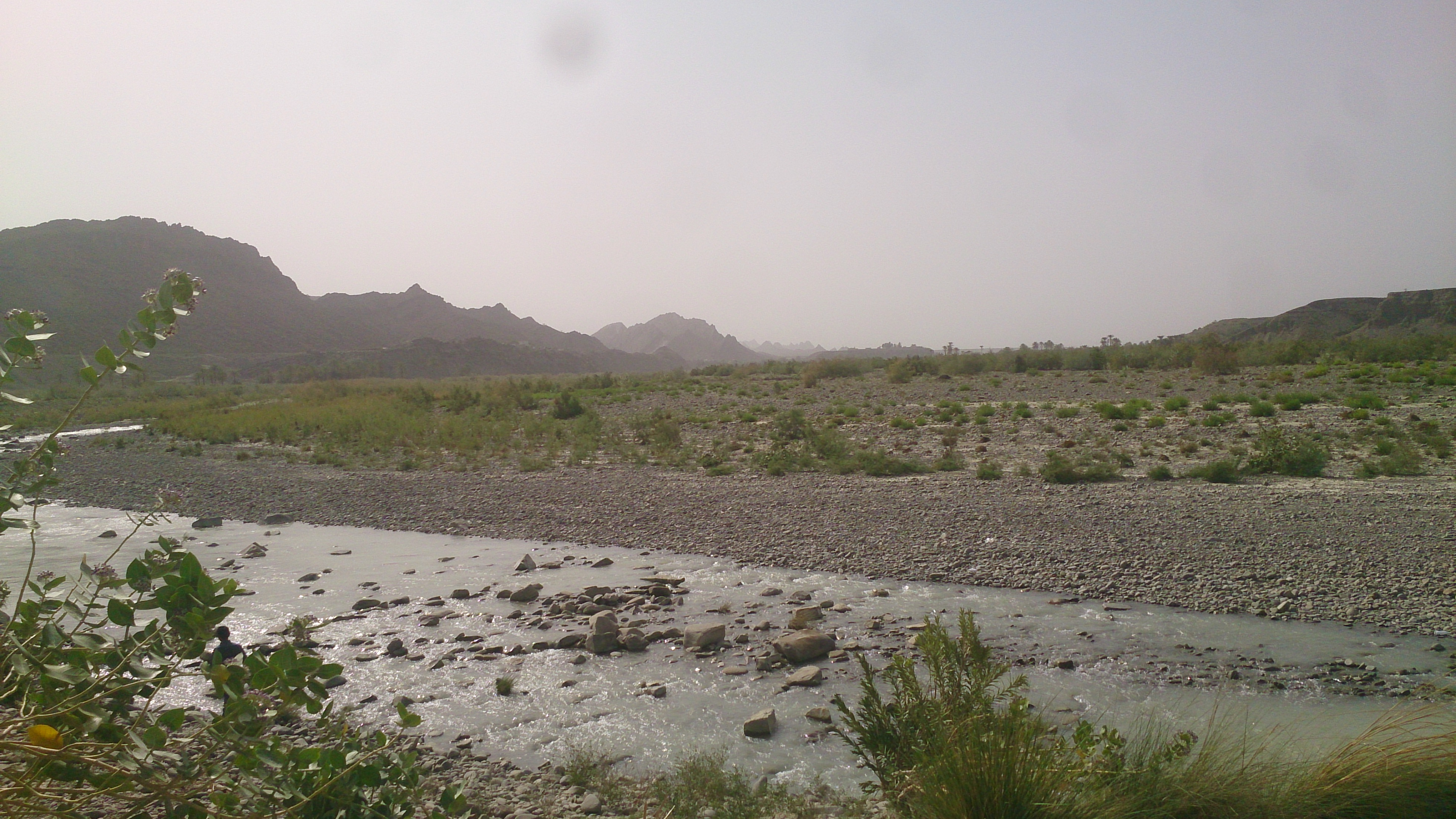 Picard: عکسی از رودخانه روستای سرباز